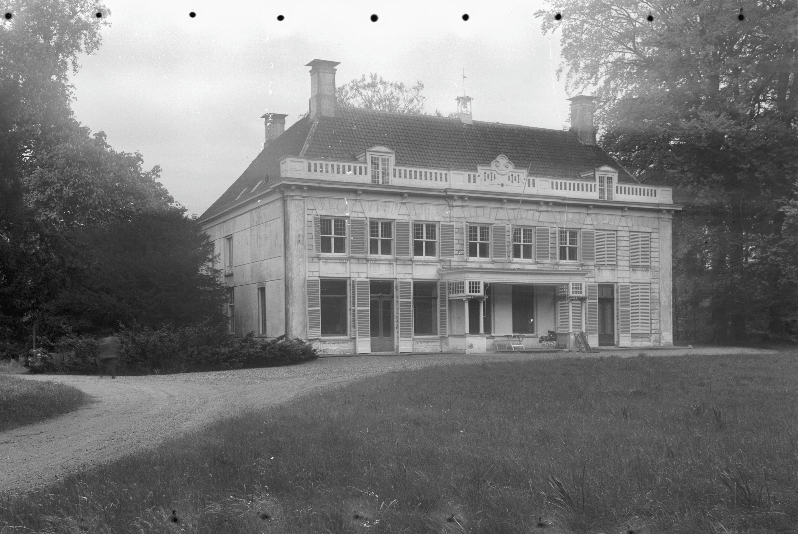 Diversen: Nieuw Amelisweer voorgevel